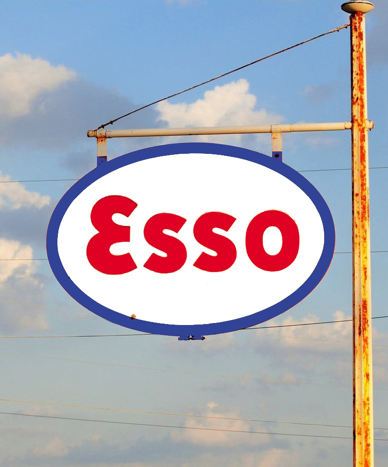 The Esso sign.